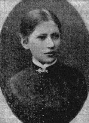 Vera Andreevna Shatilova (1857 - ca 1900)